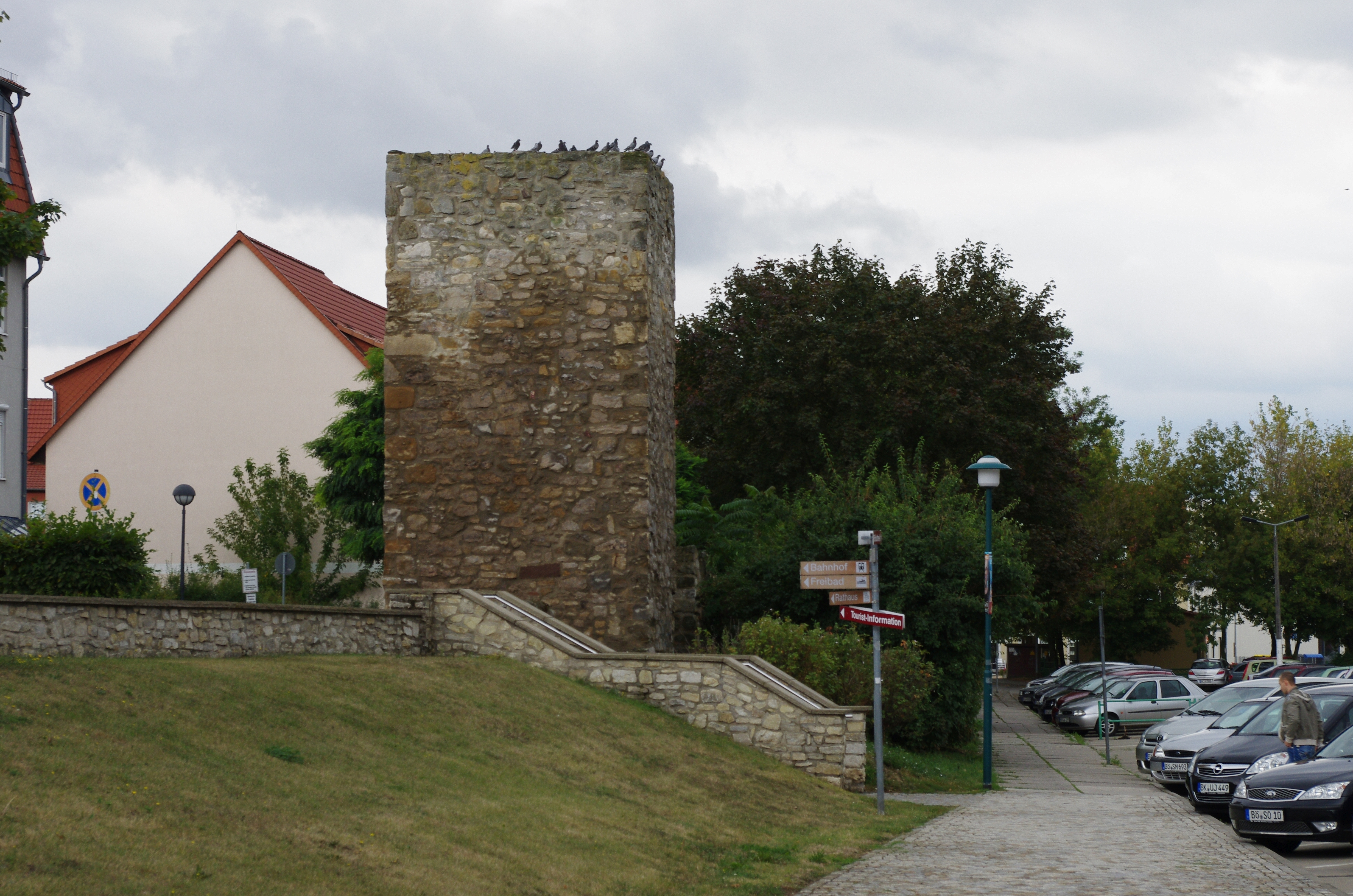 Oschersleben (Bode) in Sachsen-Anhalt. Der Stadtmauerturm befindet sich am westlichen Stadtrand von Oschersleben und steht unter Denkmalschutz.